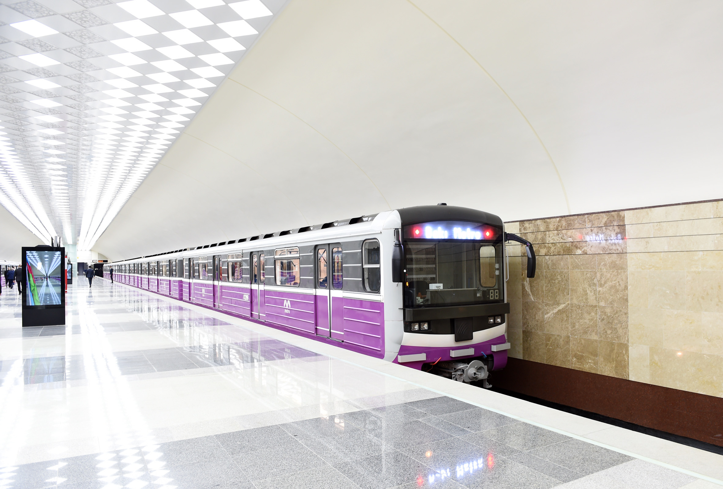 Avtovağzal stansiyası